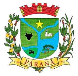 Bandeira de Paranã, Tocantins, Brasil - Domínio Público, de acordo com a Lei brasileira em Propriedade Industrial (Lei 9.279 de 14 de maio de 1996), Capítulo IV, Artigo 191